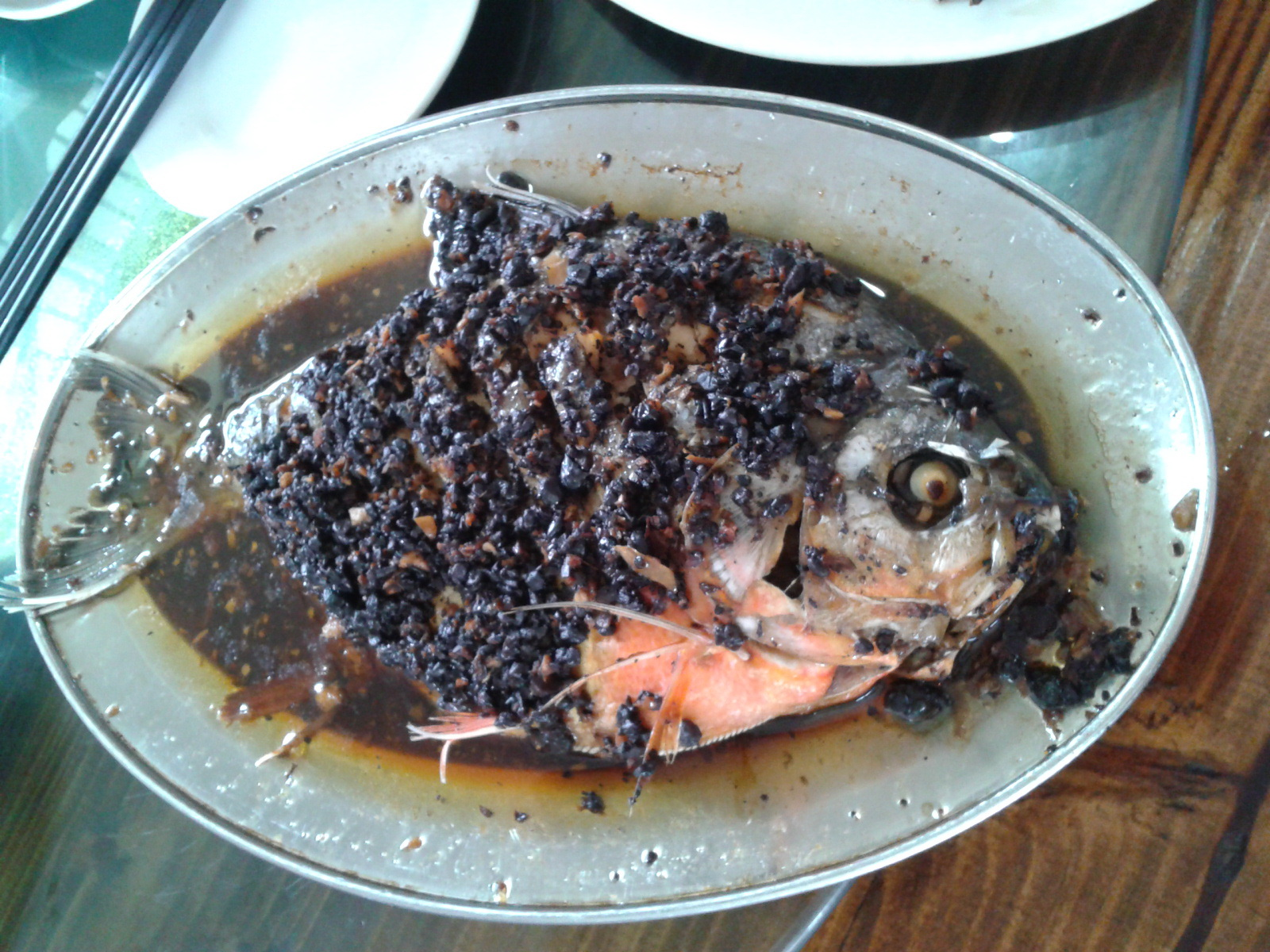 中文（香港）: 中國地方菜式 豆豉蒸鱼